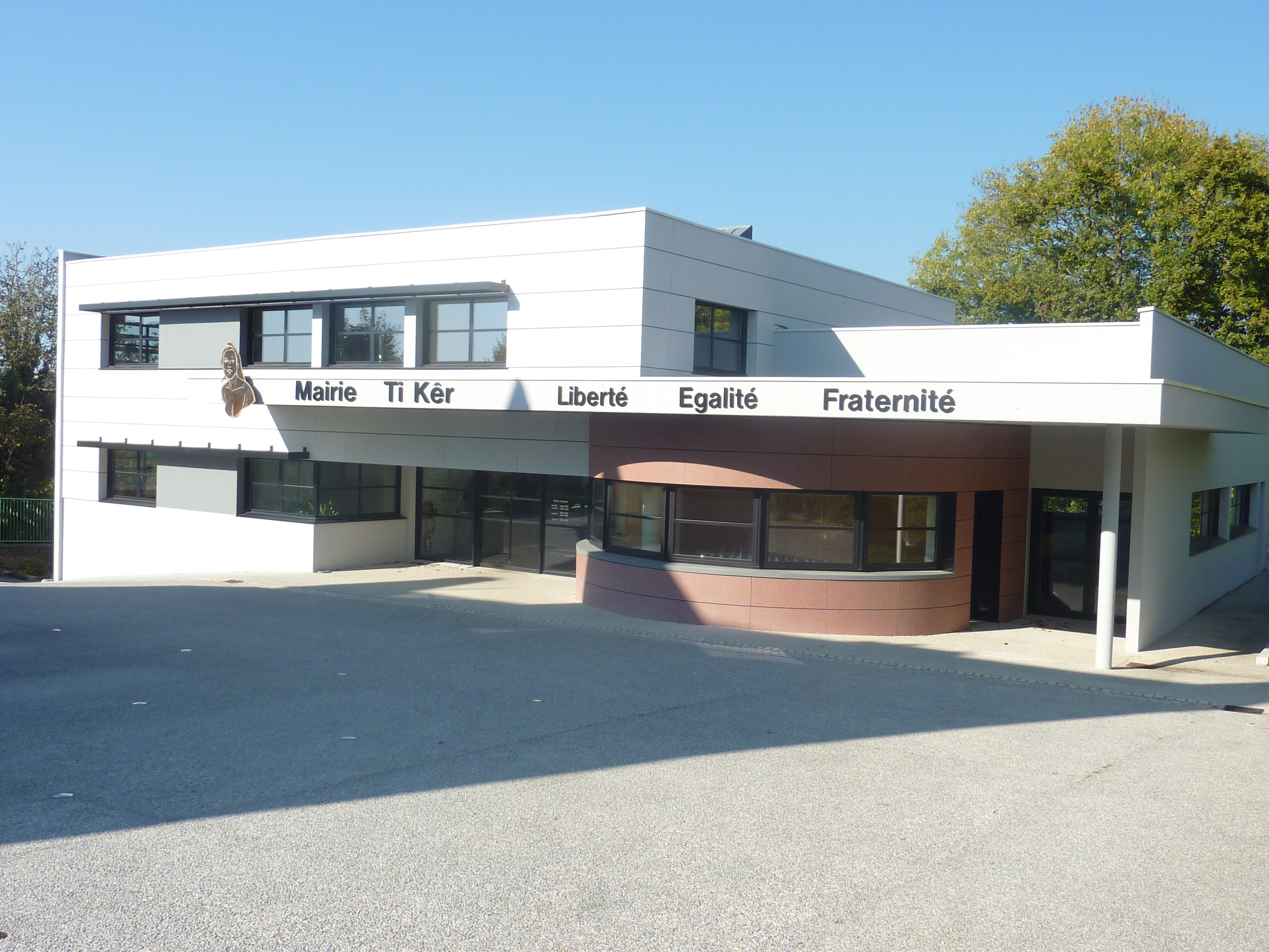 Pont-de-Buis : la mairie moderne (face à l'ancienne mairie), Ty Ker en langue bretonne